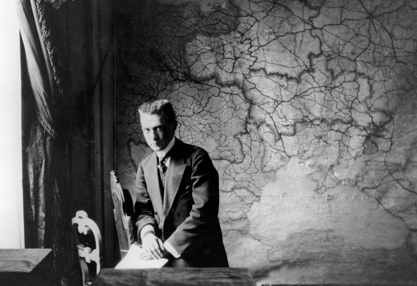 Aleksandr Kérenski.